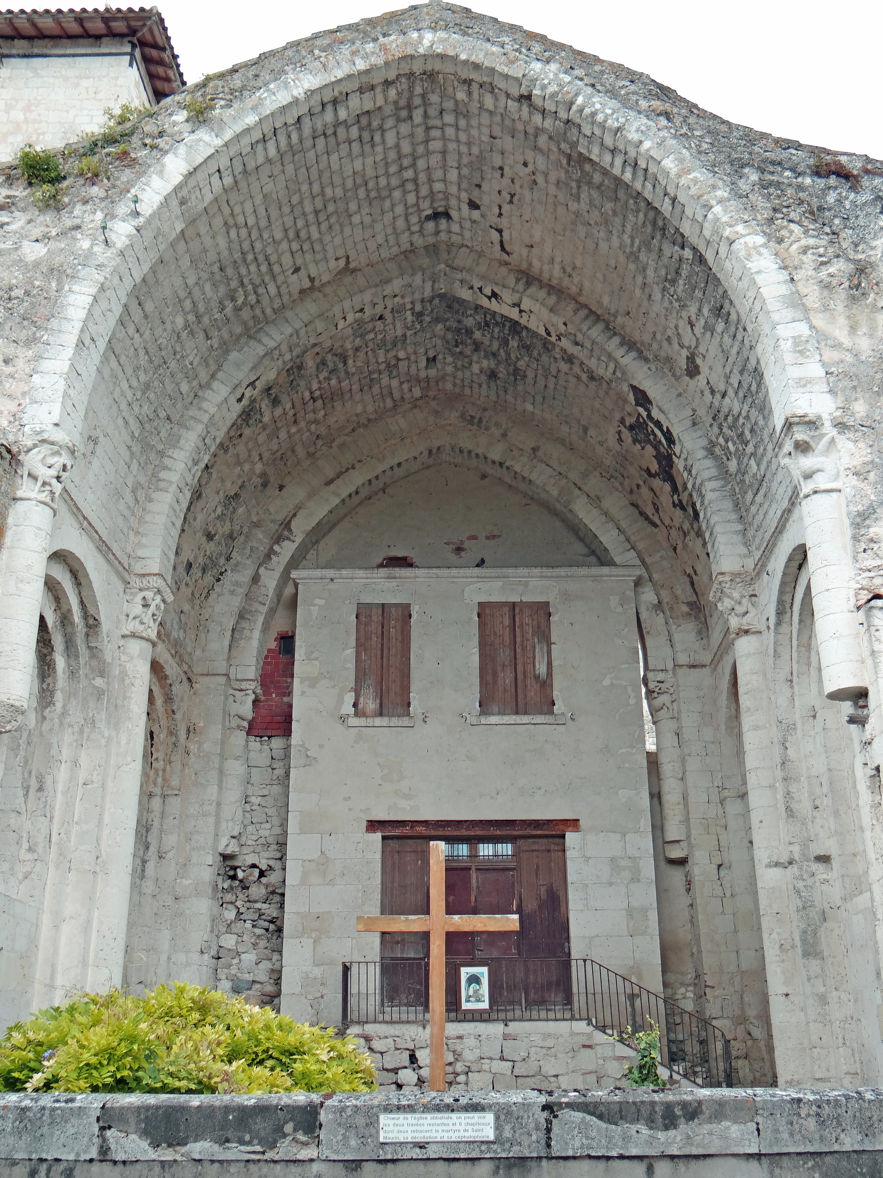 Abbaye de Saint-Maurin - Travées droites du choeur et l'ancienne école